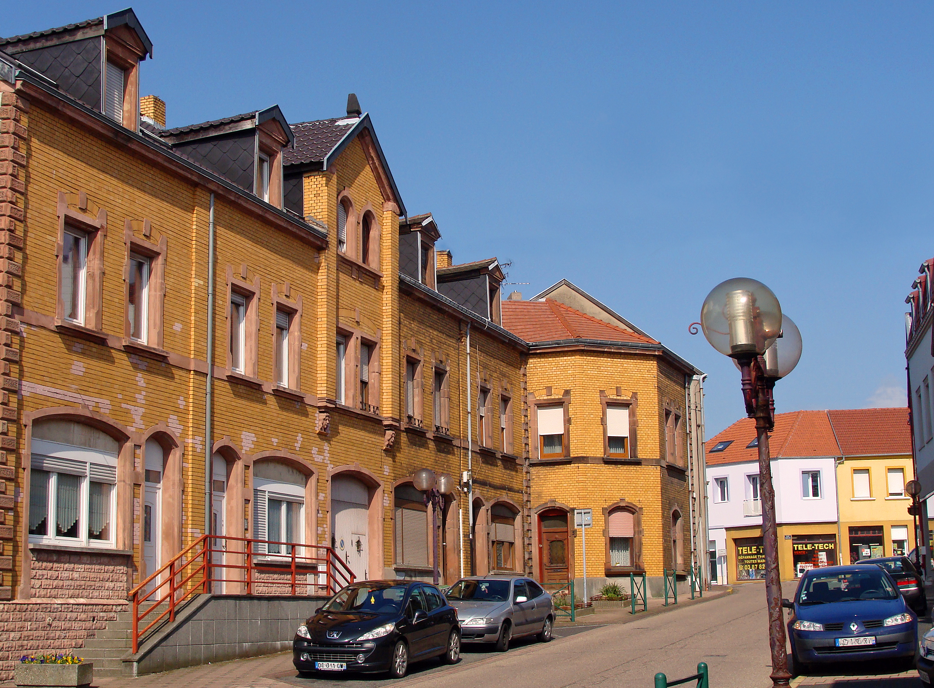 Ancienne maison Azambre (il s'y trouvait autrefois un musée géologique et un photographe nommé Schach y tenait un commerce) située rue de Saint-Avold à L'Hôpital. La bâtisse construite à l'époque impériale allemande est en briques jaunes avec figures sculptées en grès.